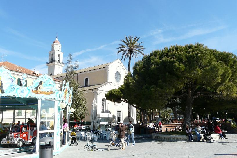 Chiesa parrocchiale di Sant'Antonio, Diano Marina, Liguria, Italia